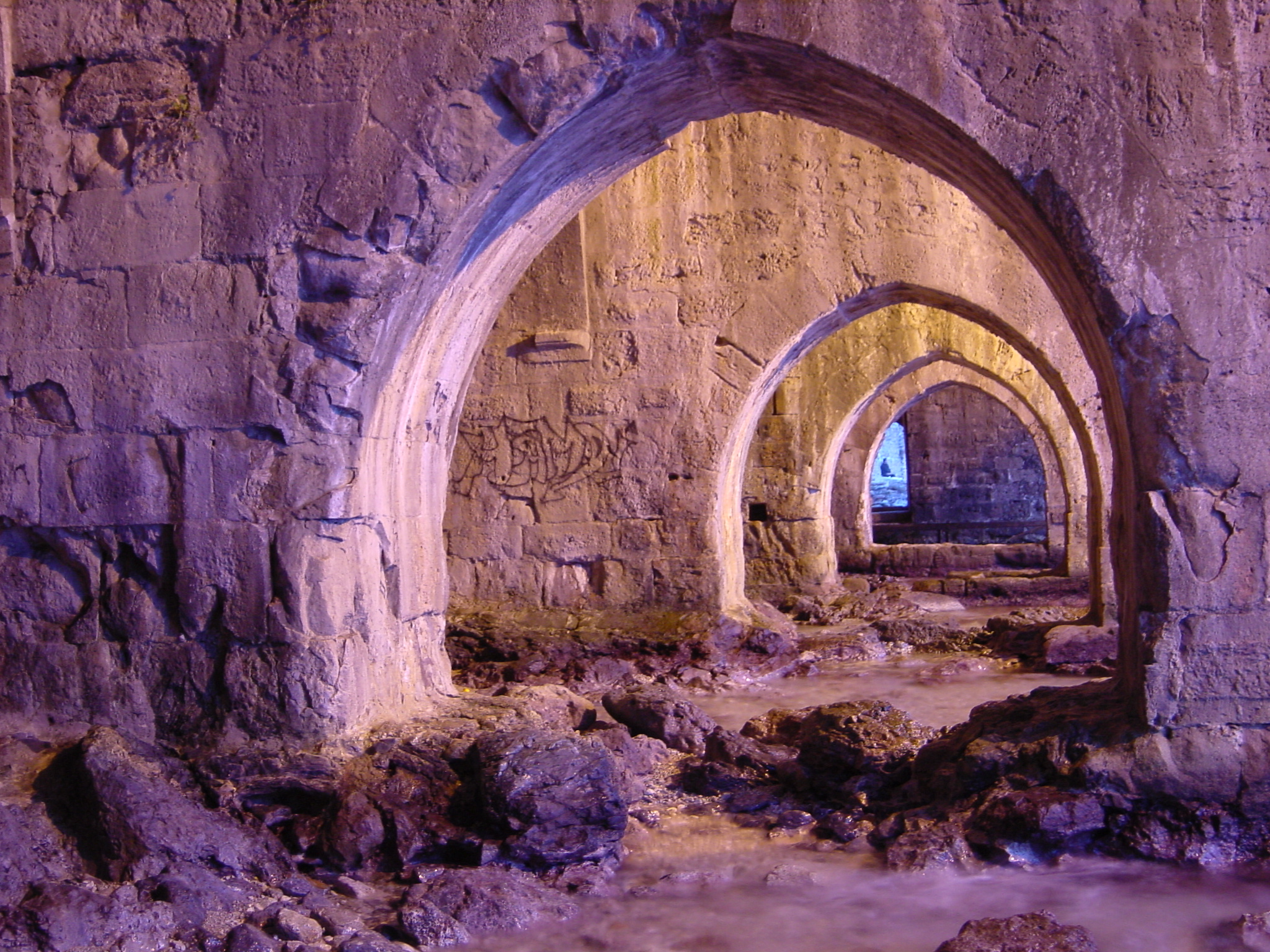 2003-12-28 01-04 T�rkei 066 Alanya, Seldschukische Schiffswerft